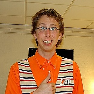 Arijan van Bavel, interview voor Radio Westerwolde vlak voor optreden in Geert Teis Stadskanaal.